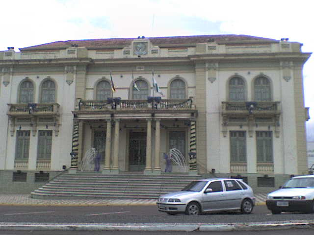 Prefeitura da cidade de Erechim.